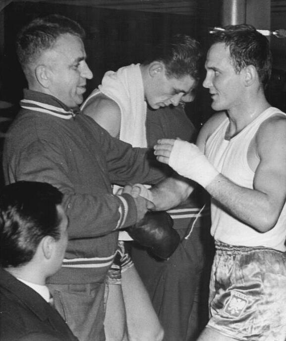 Kulej Zentralbild Semeniuk 5.11.1963 Europapokal-Boxvergleich DDR-Polen steht bevor Im zweiten Europapokal-Boxvergleich stehen sich am 8.141.1963 in Schwerin die Ländermannschaften der Volksrepublik Polen und der DDR erneut gegenüber Bekanntlich gewann die Mannschaft Polens den ersten Vergleich in Poznan 14:6. UBz: Der Europameister 1963 im Halbweltergewicht Kulej (Polen) war sich in Poznan erfolgreich, denn der DDR-Boxer Busse überstand nur zwei Runden. Hier verlässt Kulej in Poznan als glücklicher Sieger den Ring. Voraussischtlich wird Kulej in Schwerin gegen Rühl boxen, der aber auch schon eine Niederlage (Europameisterschaften 1963 in Moskau) hinnehmen mußte. Ob sich Rühl für diese Niederlage in Schwerin revanchiert.